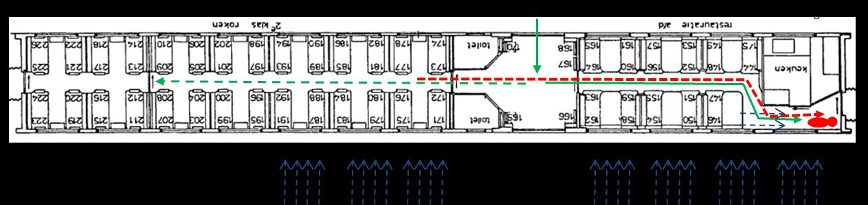 Lichaam Hansina Francina Uktolseja. Schema's van de indeling van de trein ende gebeurtenissen uit het rapport "Beëindiging van de gijzeling bij De Punt in 1977" uit 2014